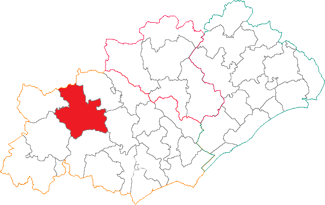 Situation du canton dans le département de l'Hérault.